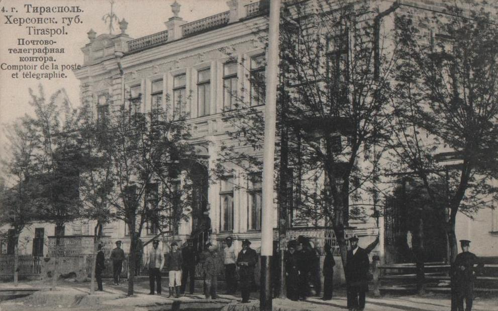 Почтовая карточка (открытое письмо) с видом почтово-телеграфной конторы в Тирасполе.